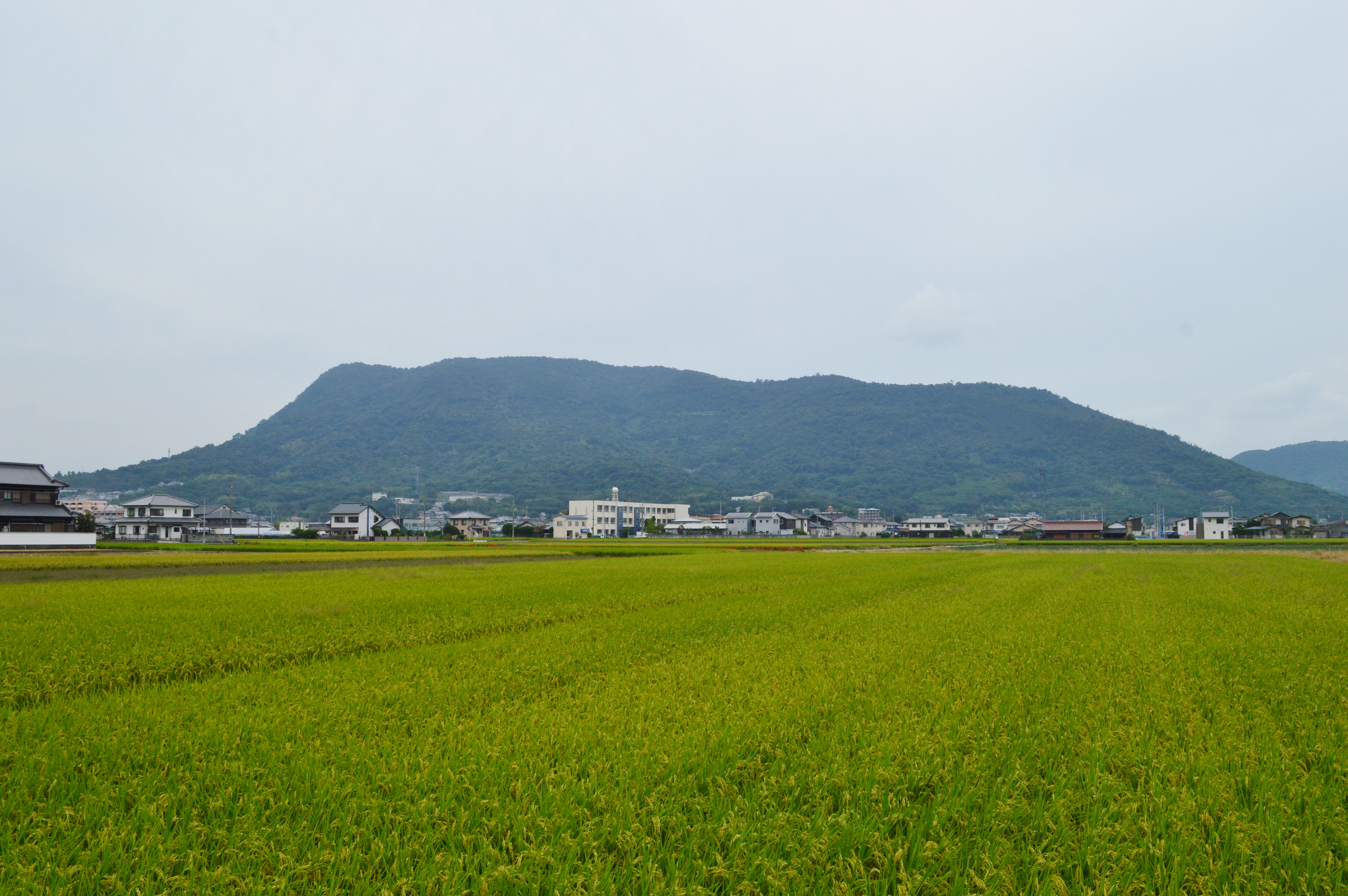 城山 (香川県) 全景